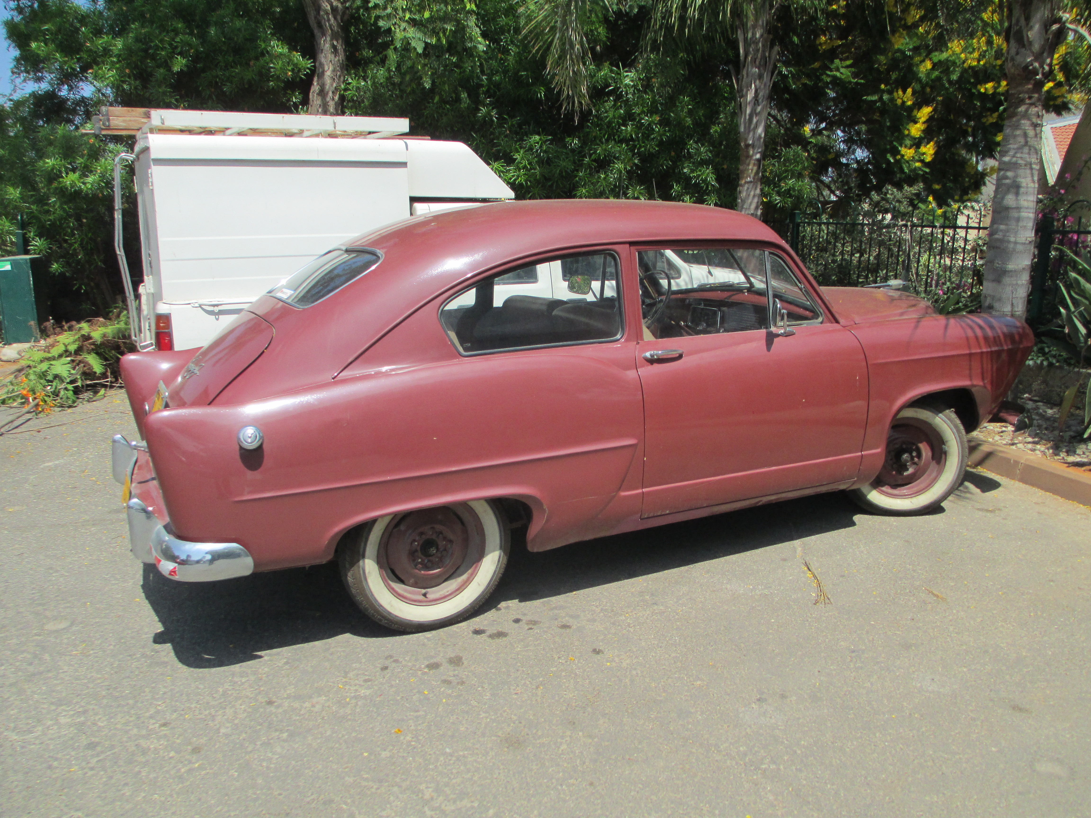 רכב אספנות הנרי ג'י בישראל